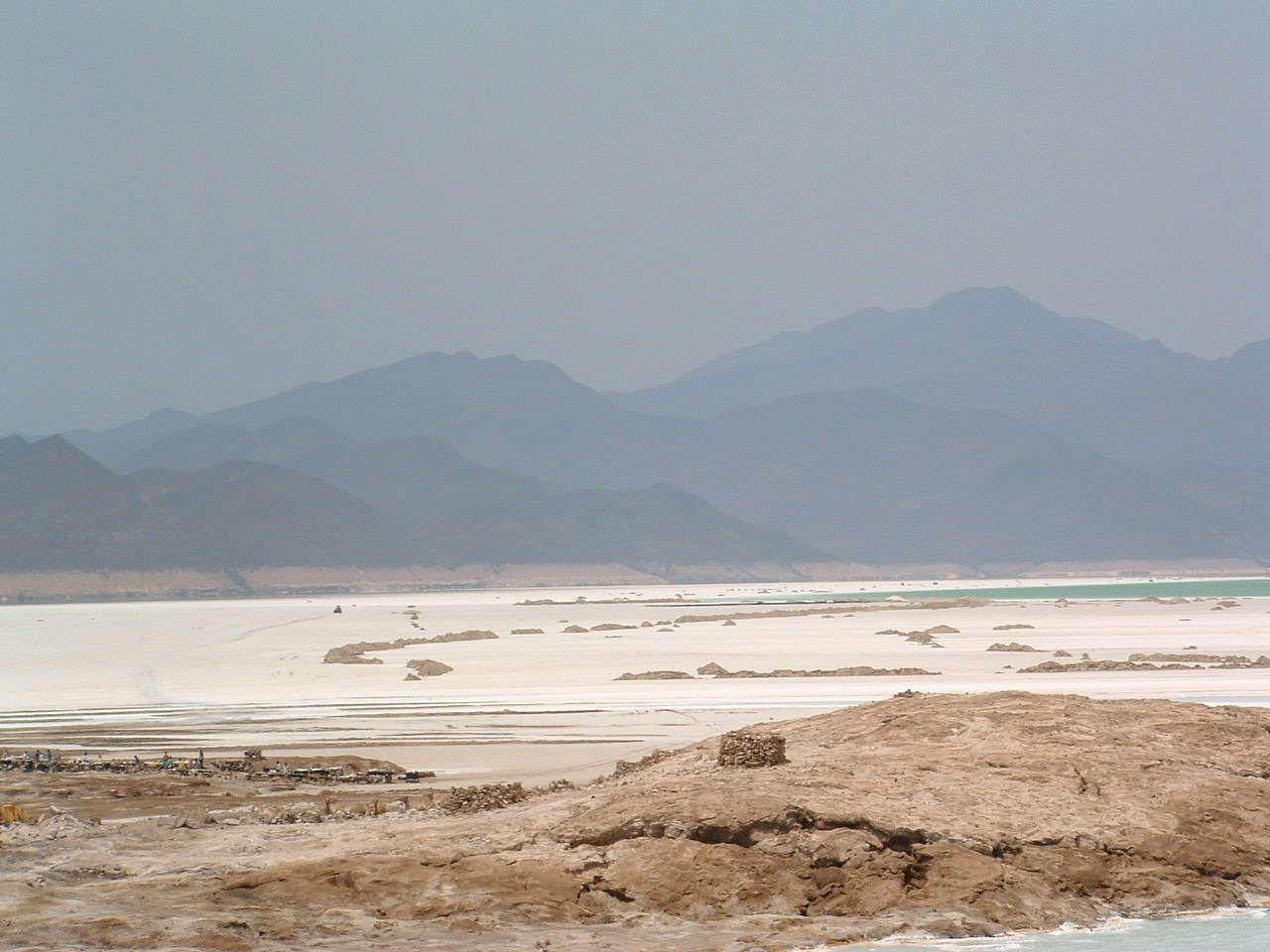 Vue générale du lac Assal, en 2004.